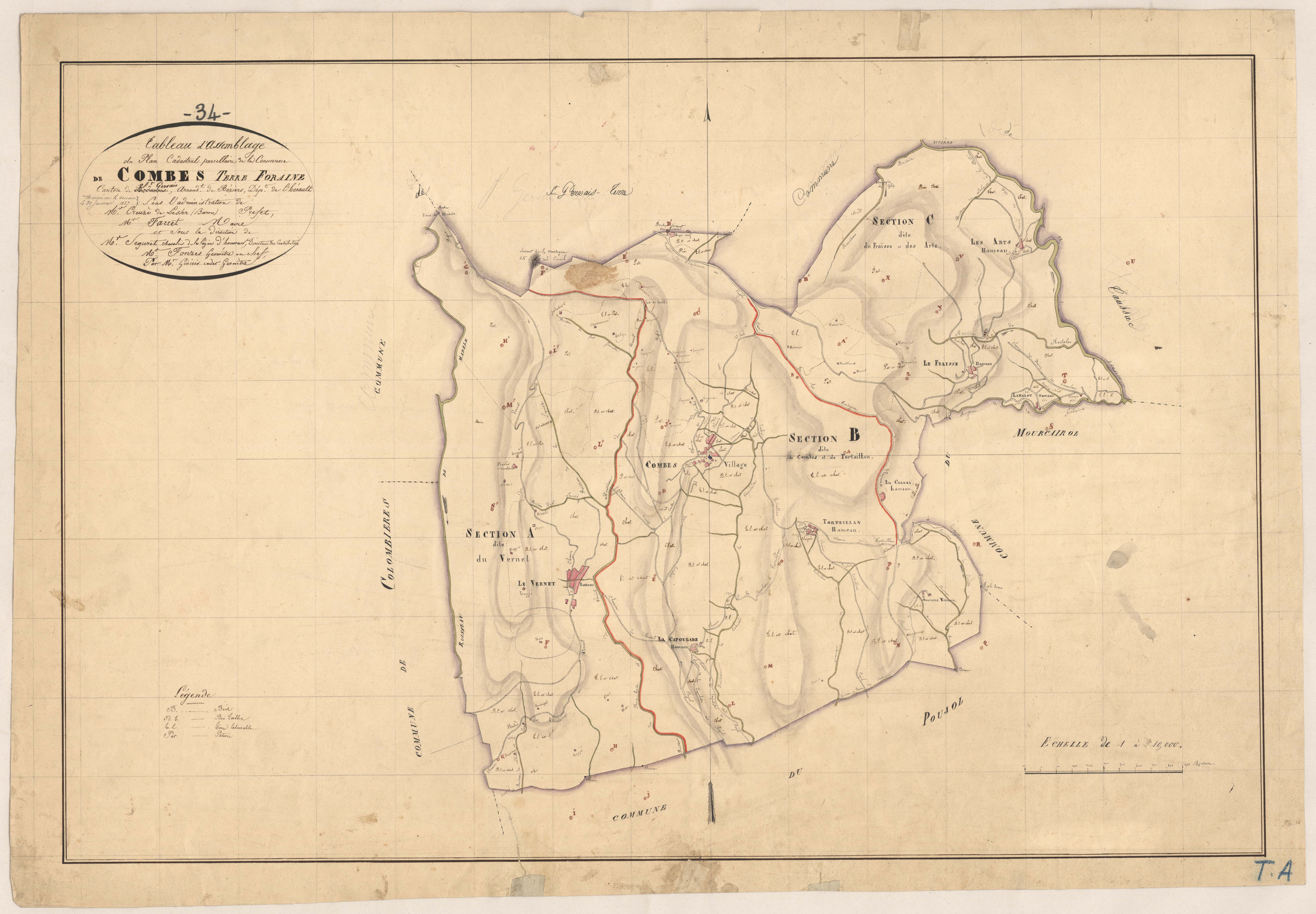 Combes. - Cadastre napoléonien : tableau d'assemblage